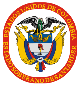 Escut de la província de Santander (Colòmbia) fins el 2004